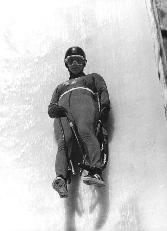 Ute Rührold ADN-ZB Demme 7.1.1973-Oberhof: 1. Durchgang zur DDR-Meisterschaft im Rennschlittensport am 6.1.1973-Nach den ersten zwei Rennen setzte sich Ute Rührold (SC Traktor Oberwiesenthal), hier bei einem früheren Wettkampf, an die Spitze.